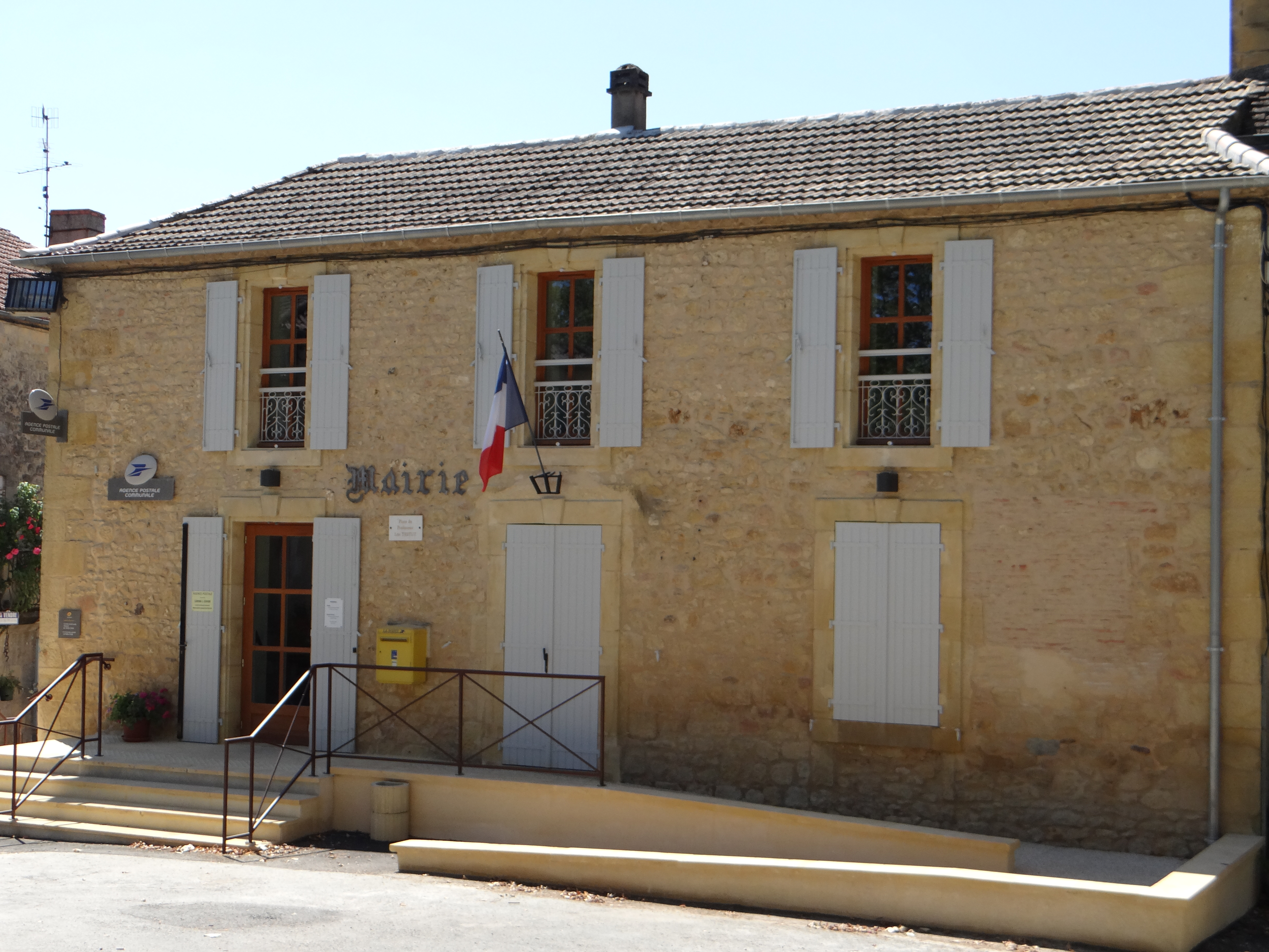 Saint-Avit-Sénieur - Mairie sur la place du village